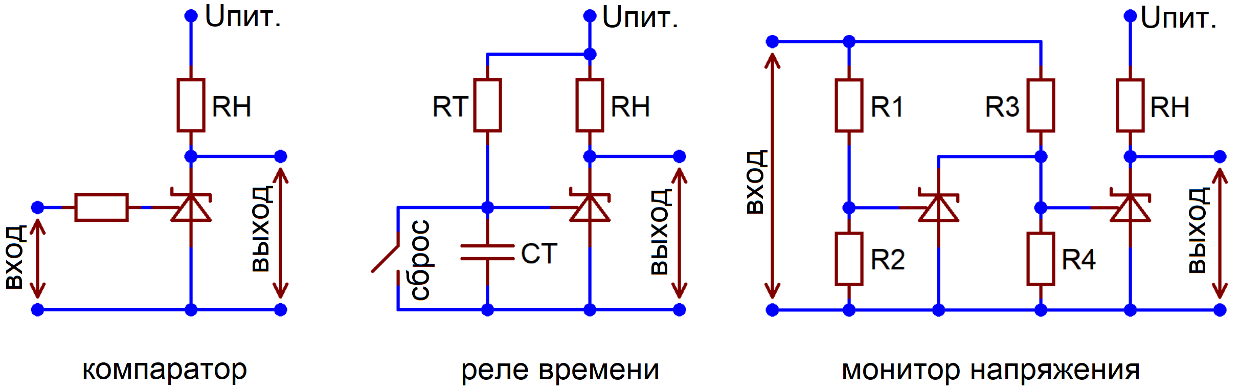 Базовая конфигурация компаратора на TL431 и ее производные. Описание и расчёт приводятся в даташите TL43xx Precision Programmable Reference и в пояснительной записке TI Using the TL431 as a Voltage Comparator